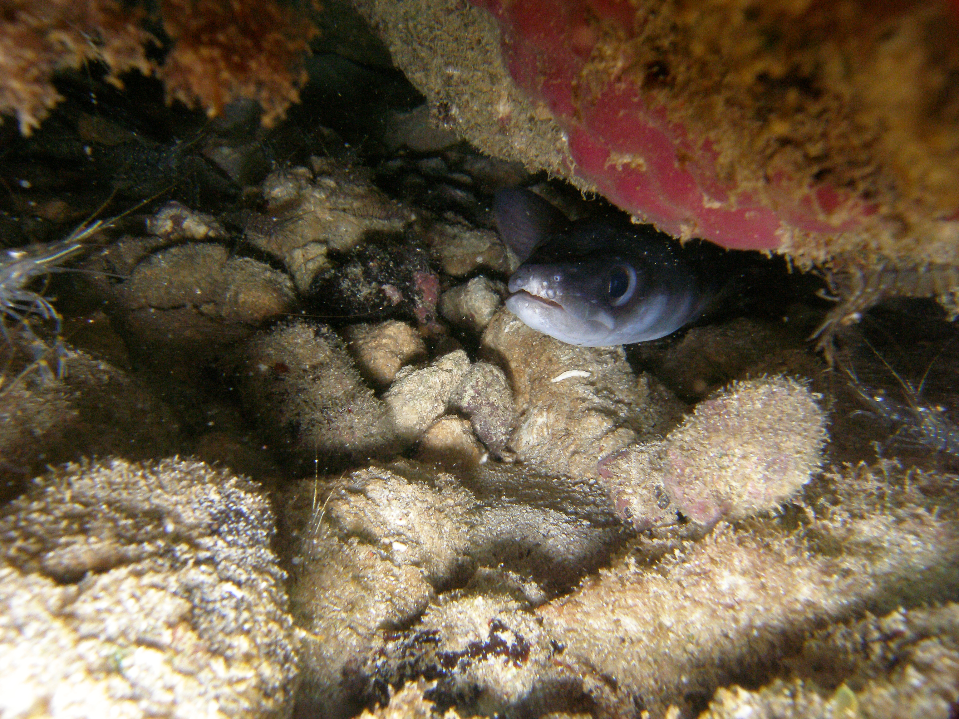 Conger eel